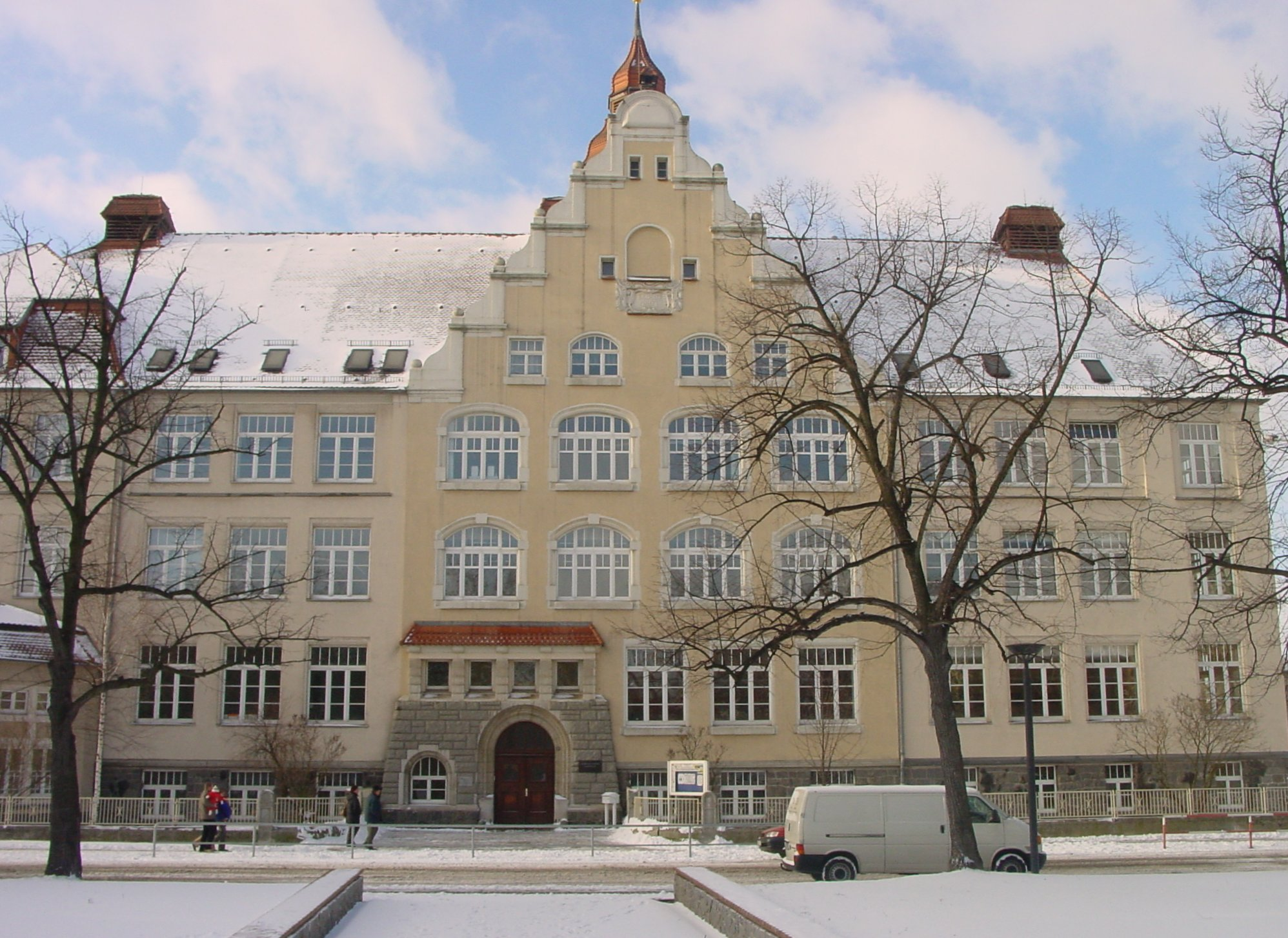 Altbau des Werner-Heisenberg-Gymnasiums in Riesa am Ebert-Platz